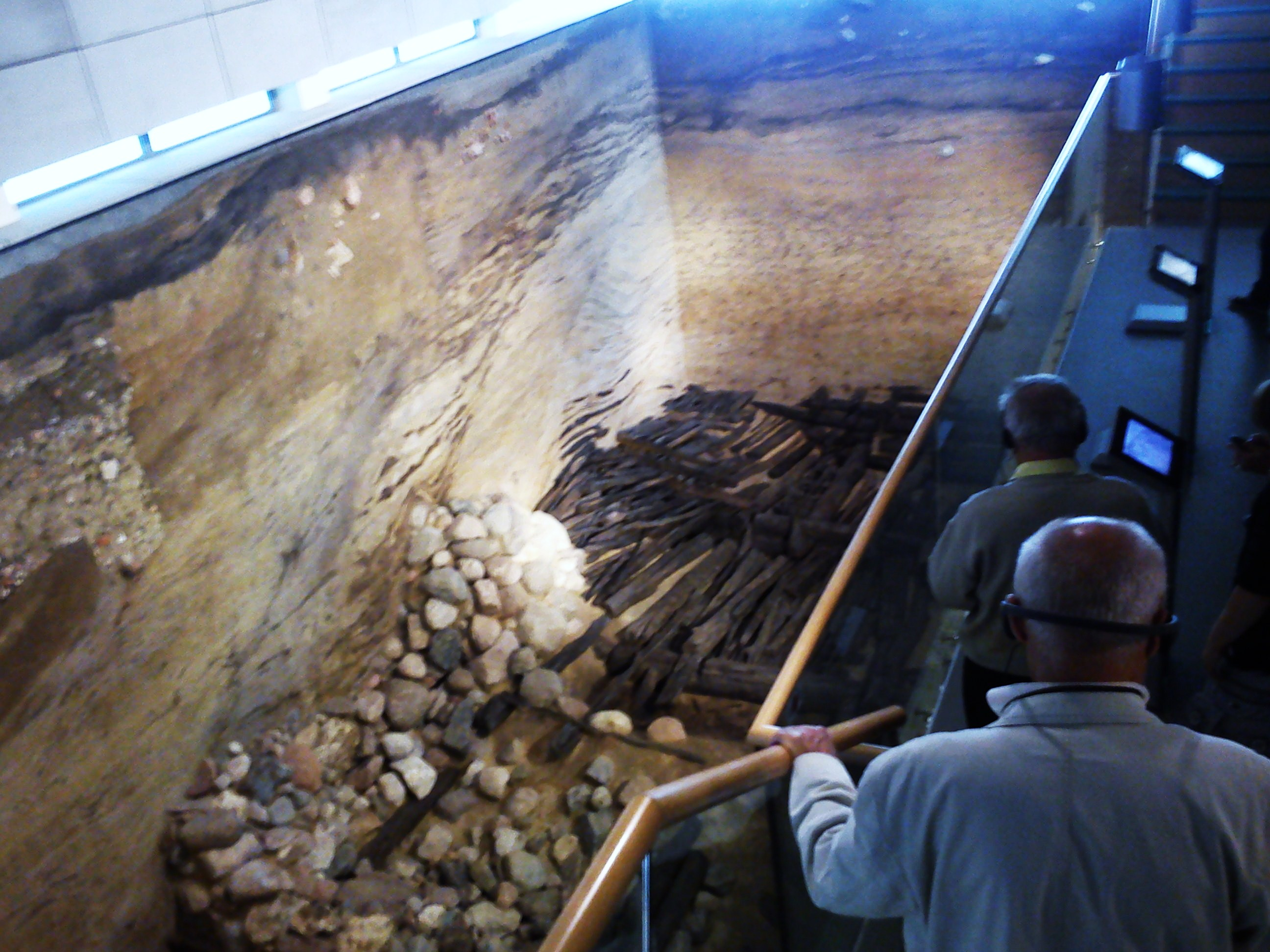 Rezerwat archeologiczny Genius Loci - Poznań, Ostrów Tumski.